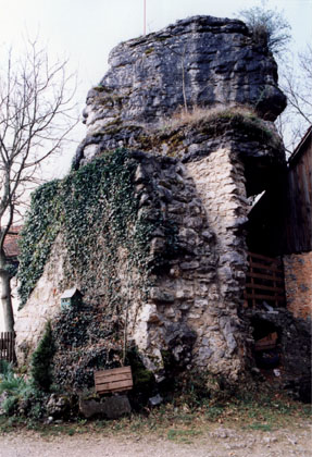 Burg Wolkenstein, Reste einer Mauer oder eines Turmes